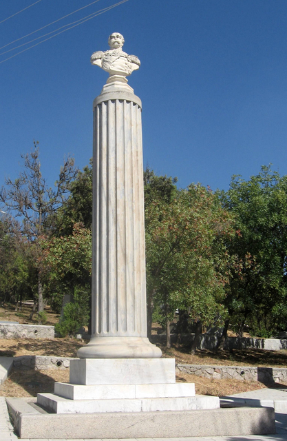 Admiral Kyslynskyi grave